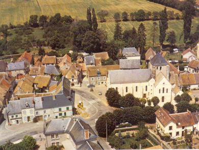 vue de la place de l'église, de la mairie et des principaux commerces.